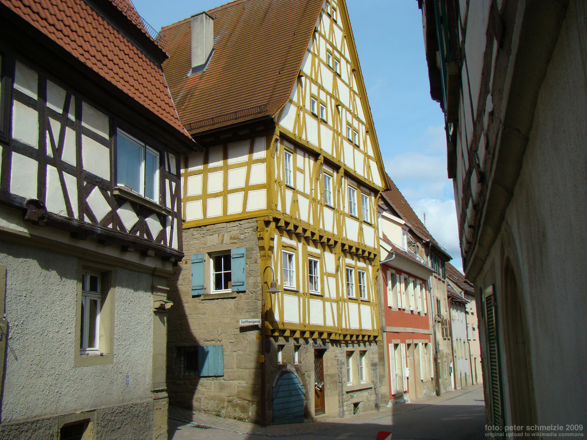 Historisches Gebäude Kettengasse 9 in Eppingen